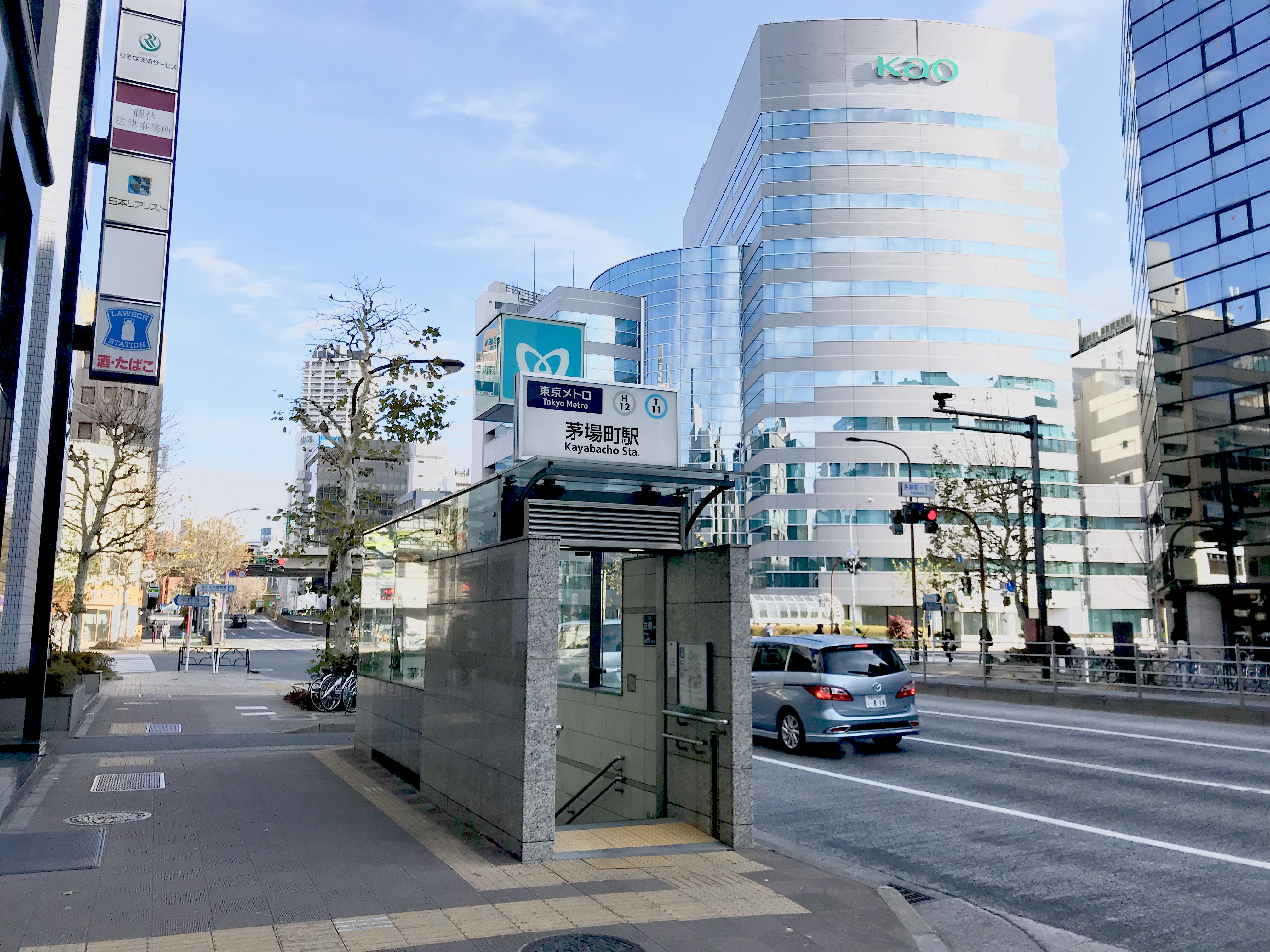 東京メトロ東西線・日比谷線茅場町駅5番出入口